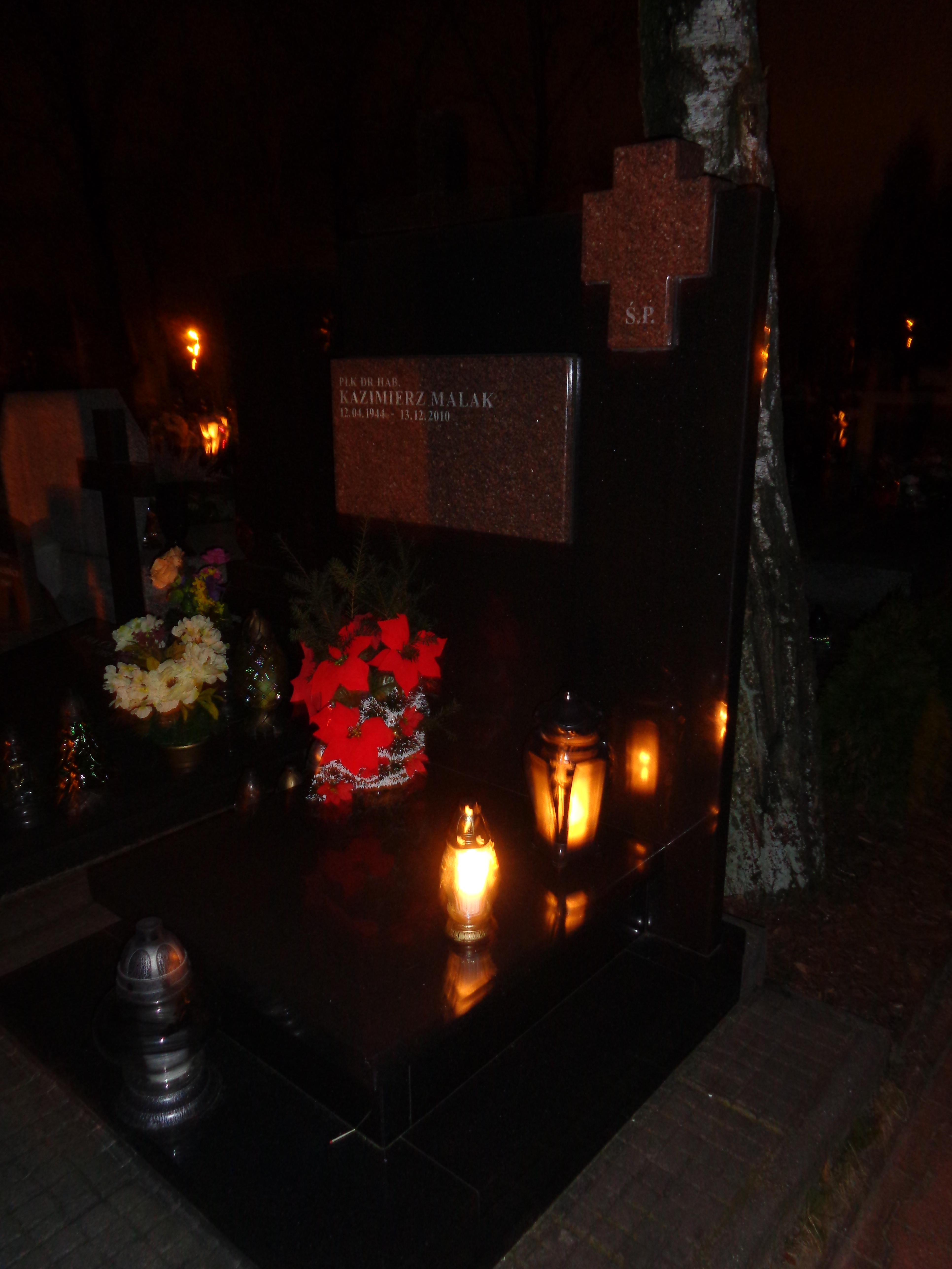 Grób profesora Kazimierza Malaka na cmentarzu przy ulicy Grzybowej